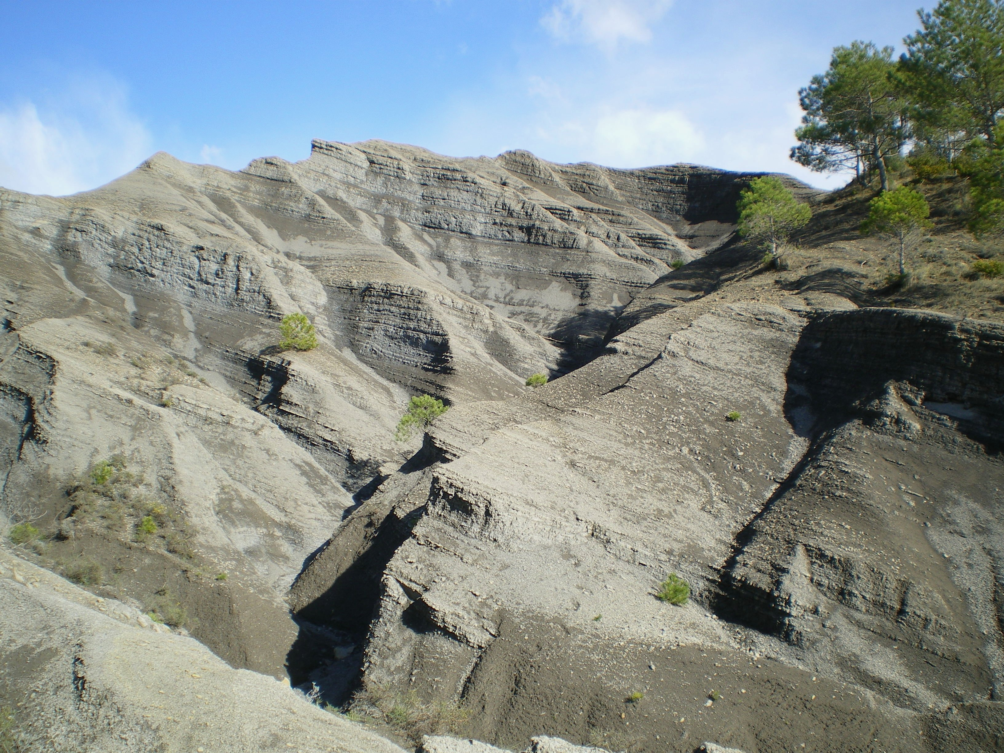 Terreros